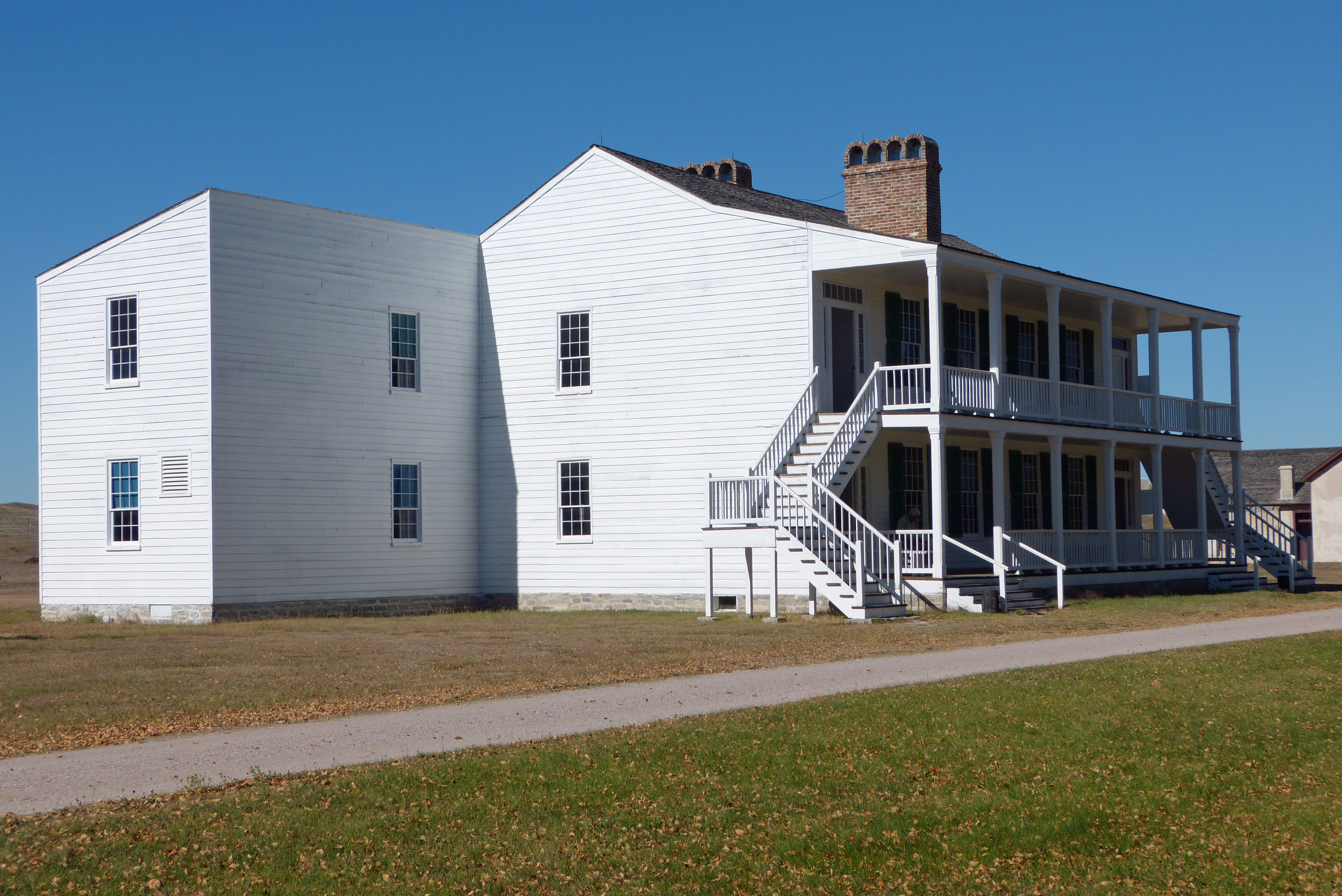 Old Bedlam Haus - Haus der ledigen Offiziere